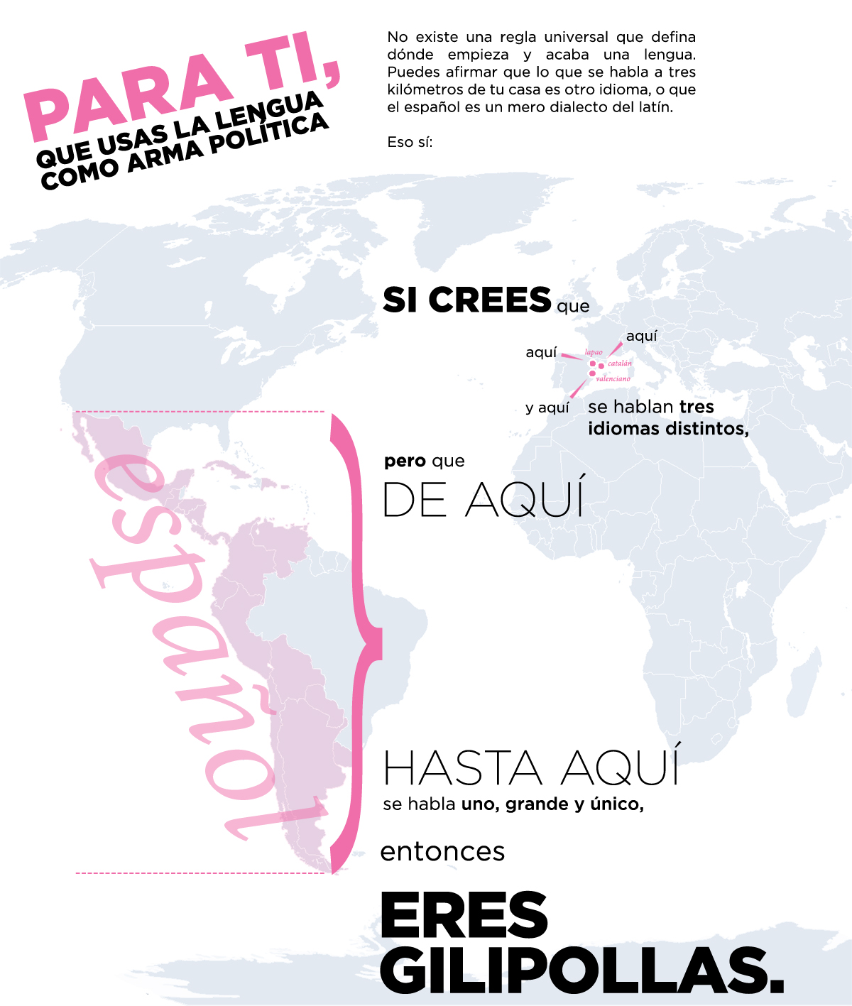 Imatge d'Edgar Cantero sobre la consideració de "Facao" de la llengua catalana a la Franja d'Aragó, i sobre el secessionisme lingüístic.